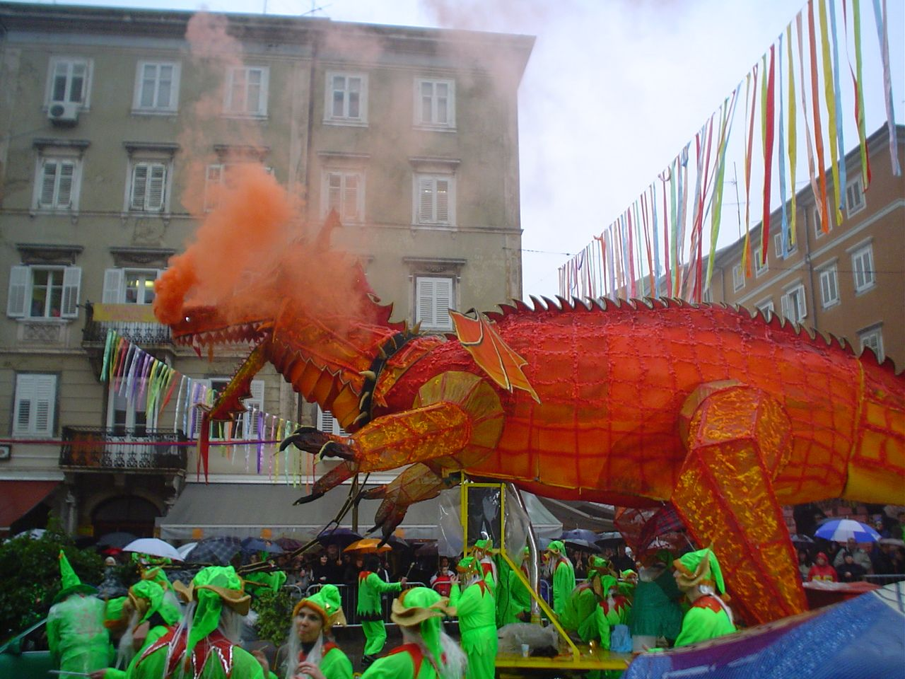 Rijeka Carnival – Mask dragon